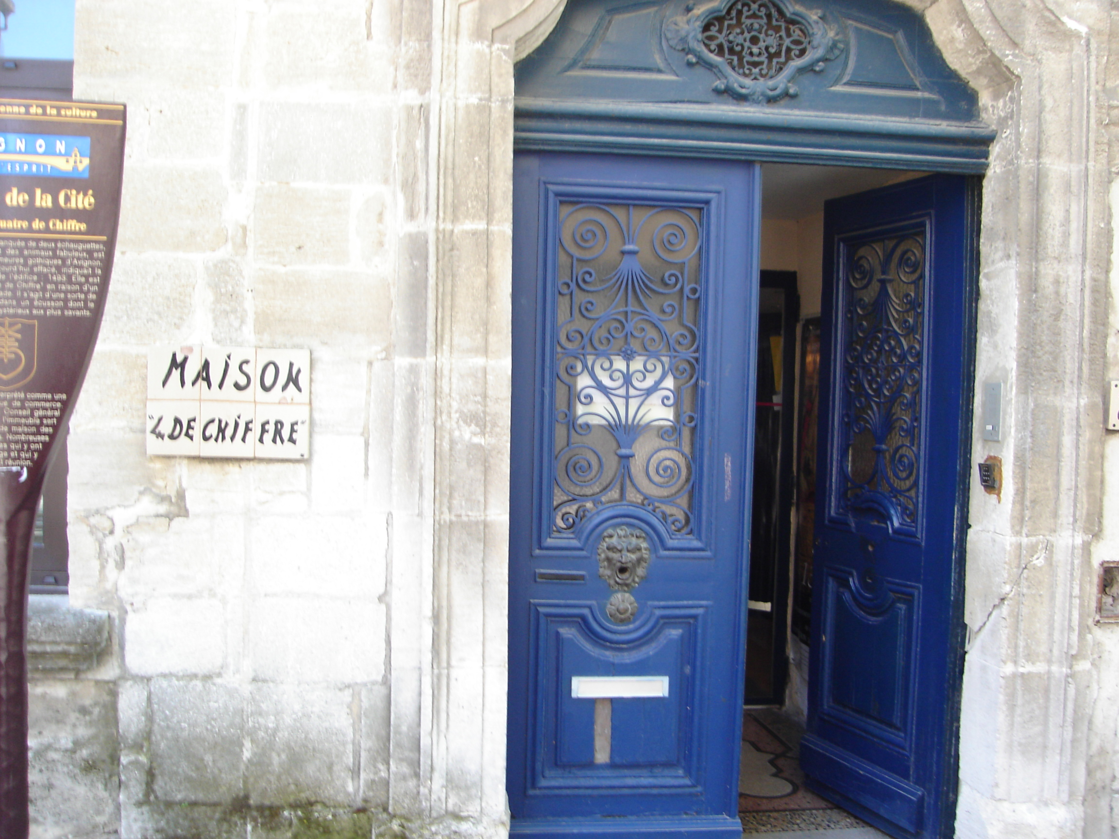 Porte entrée Maison du quatre de chiffre à Avignon